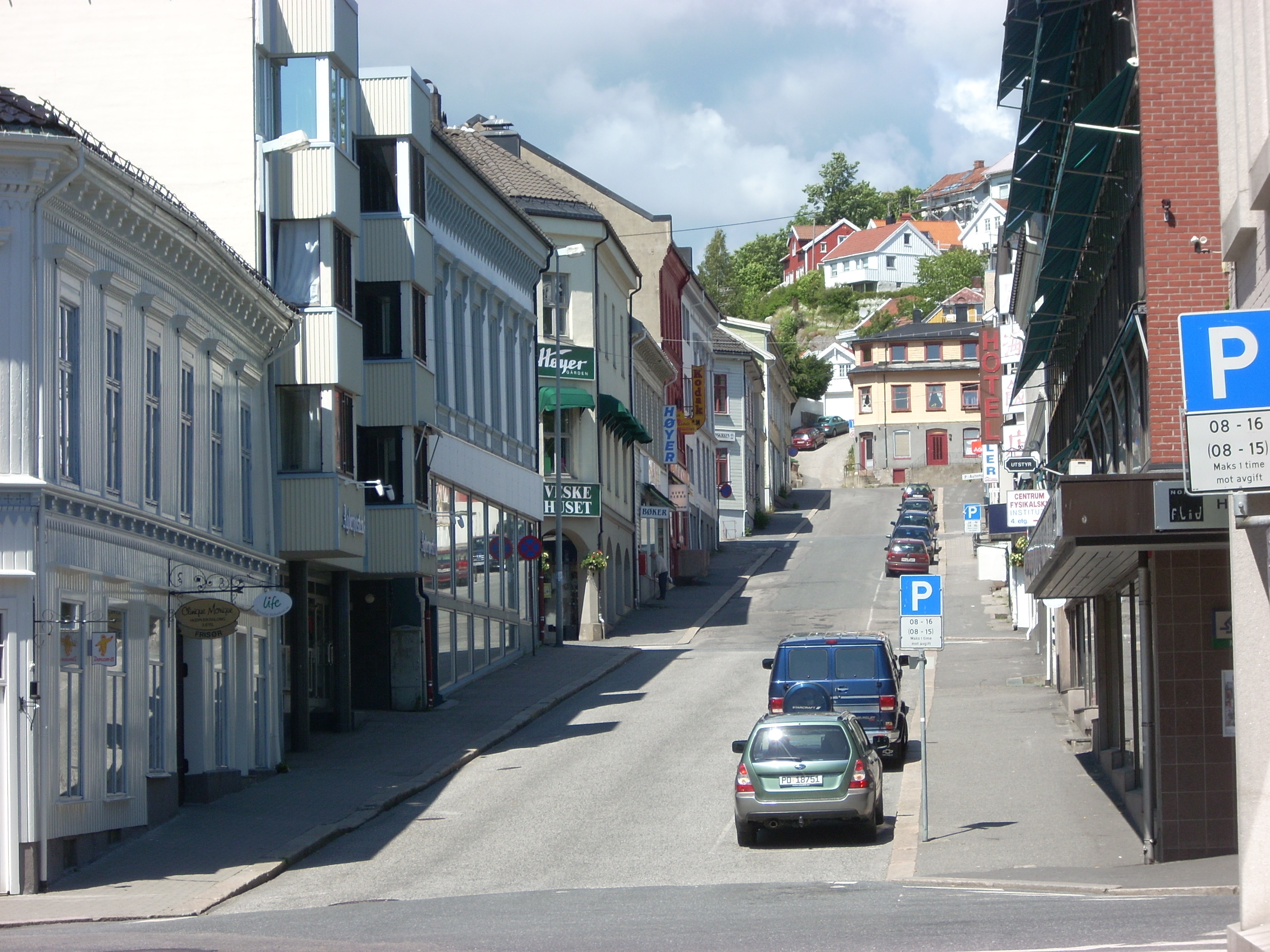 Østregate i Arendal